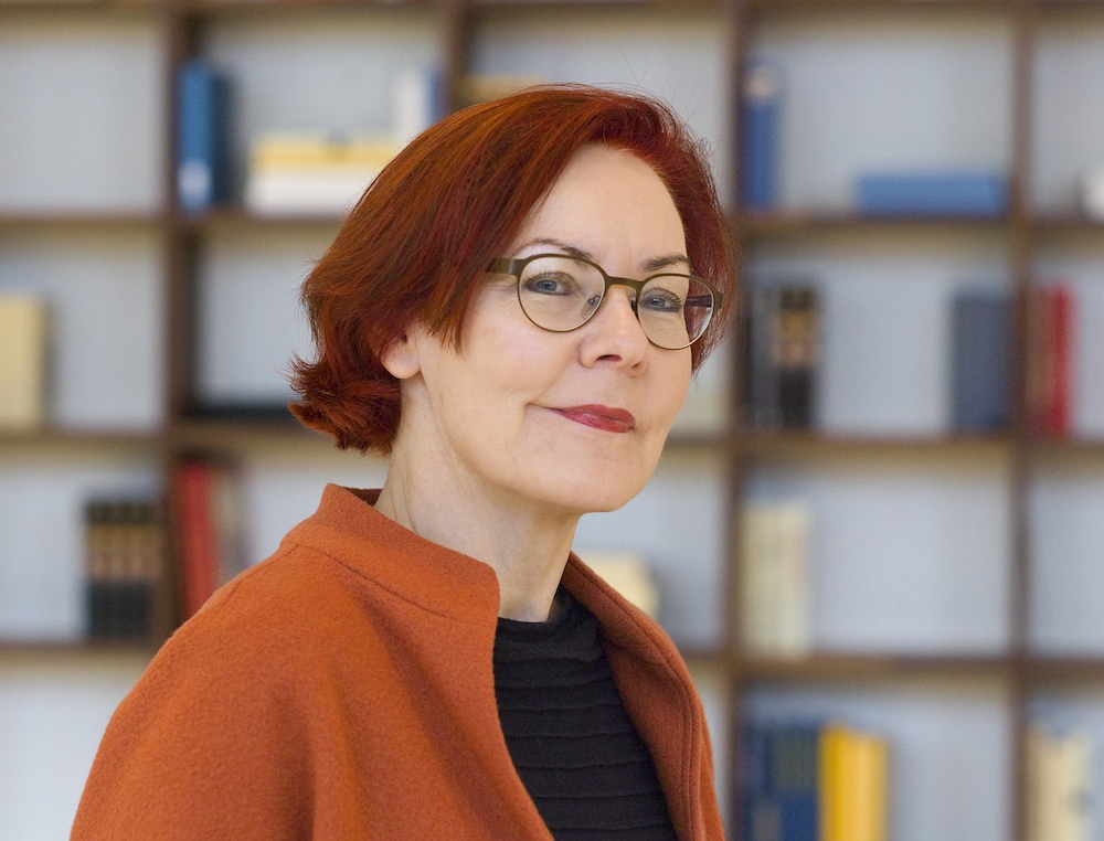 Irene Ferchl, Herausgeberin des "literaturblatts für baden-württemberg"